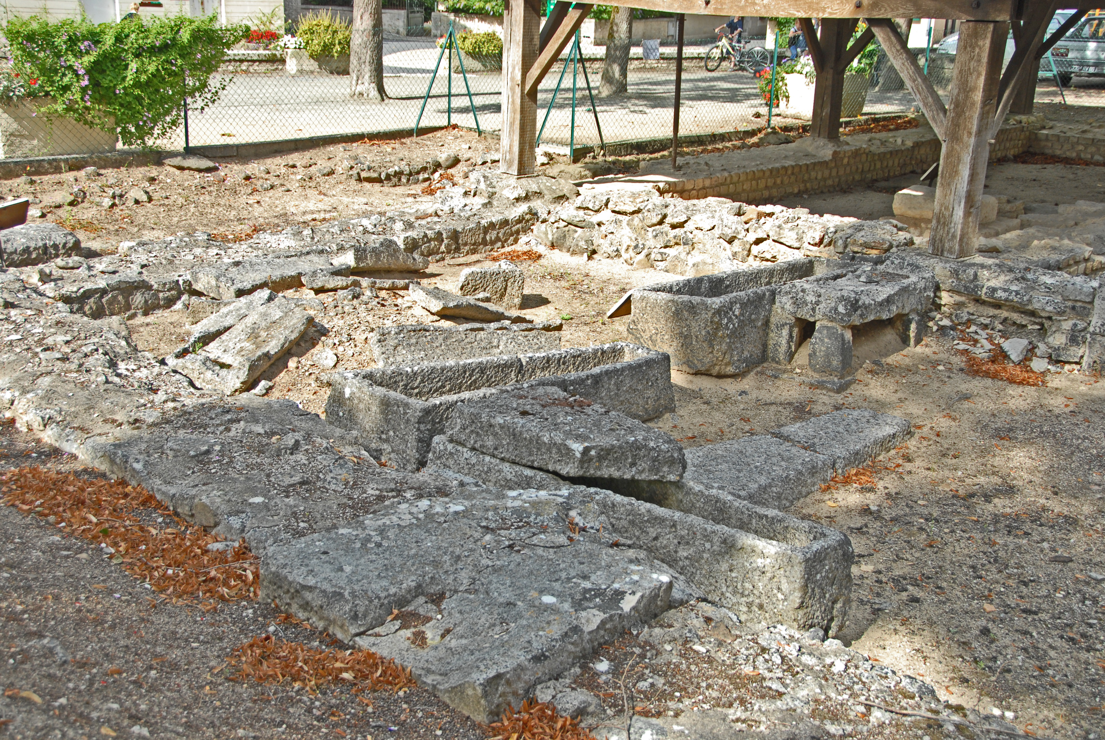 Civaux, Sanktuarium, Nordwestecke